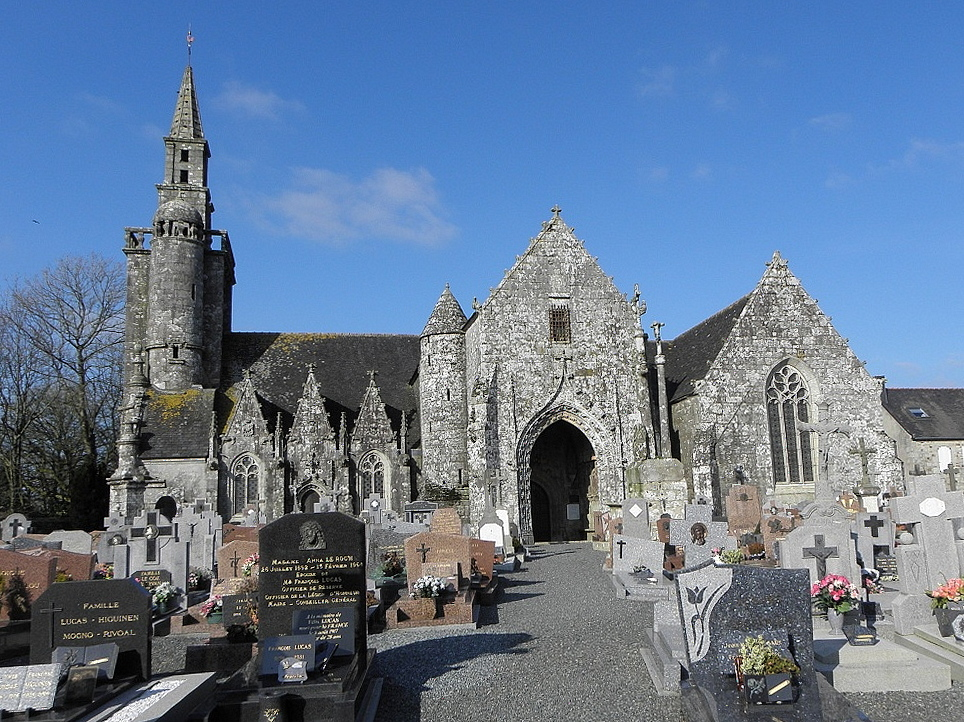 Vue méridionale de l'église Notre-Dame de Plourac'h (22) et de son calvaire. This building is en partie classé, en partie inscrit au titre des Monuments Historiques. .